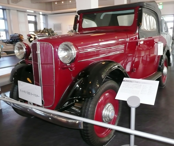 Datsun Type 15 Roadstar.